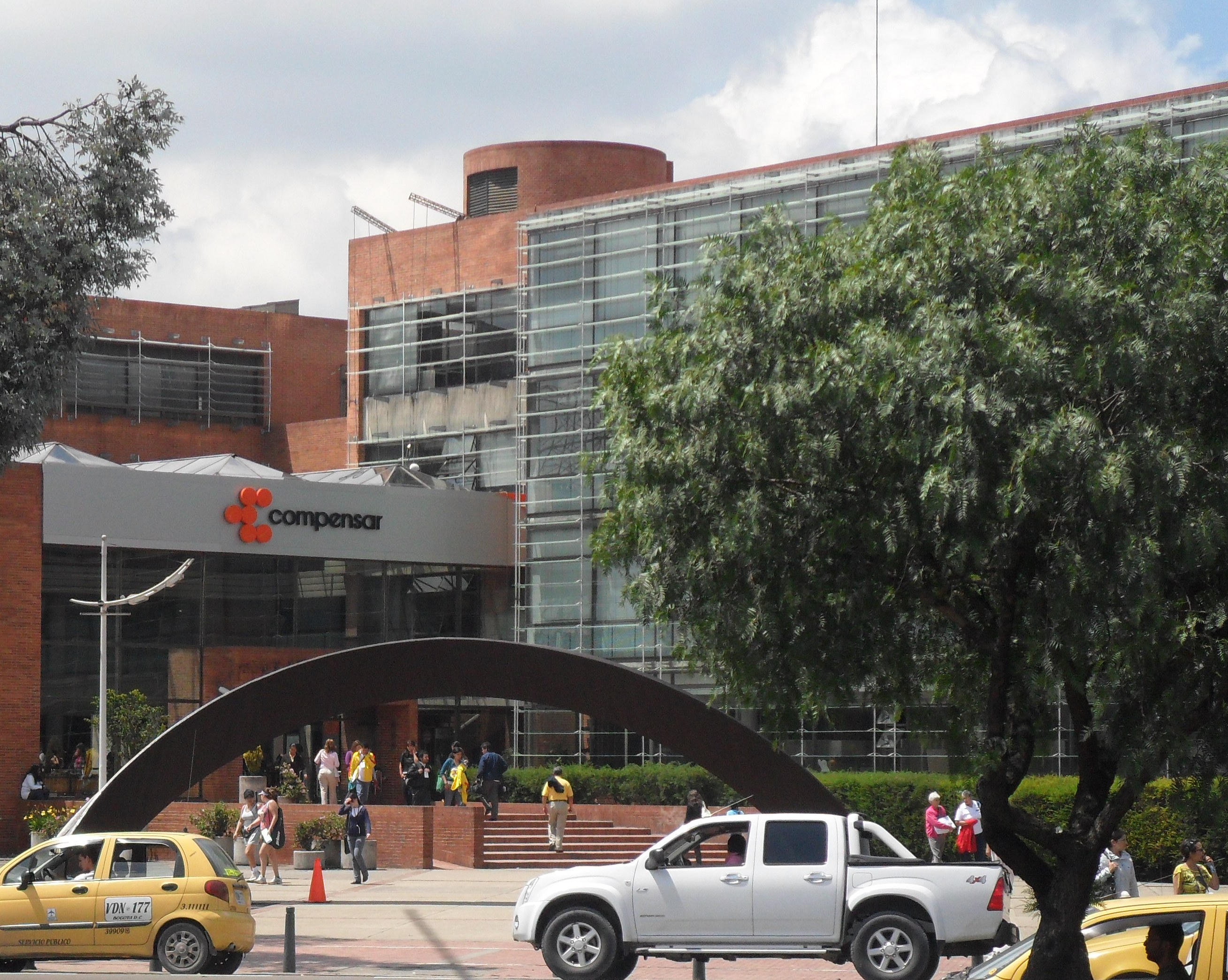 Sede de Compensar en la Avenida 68.